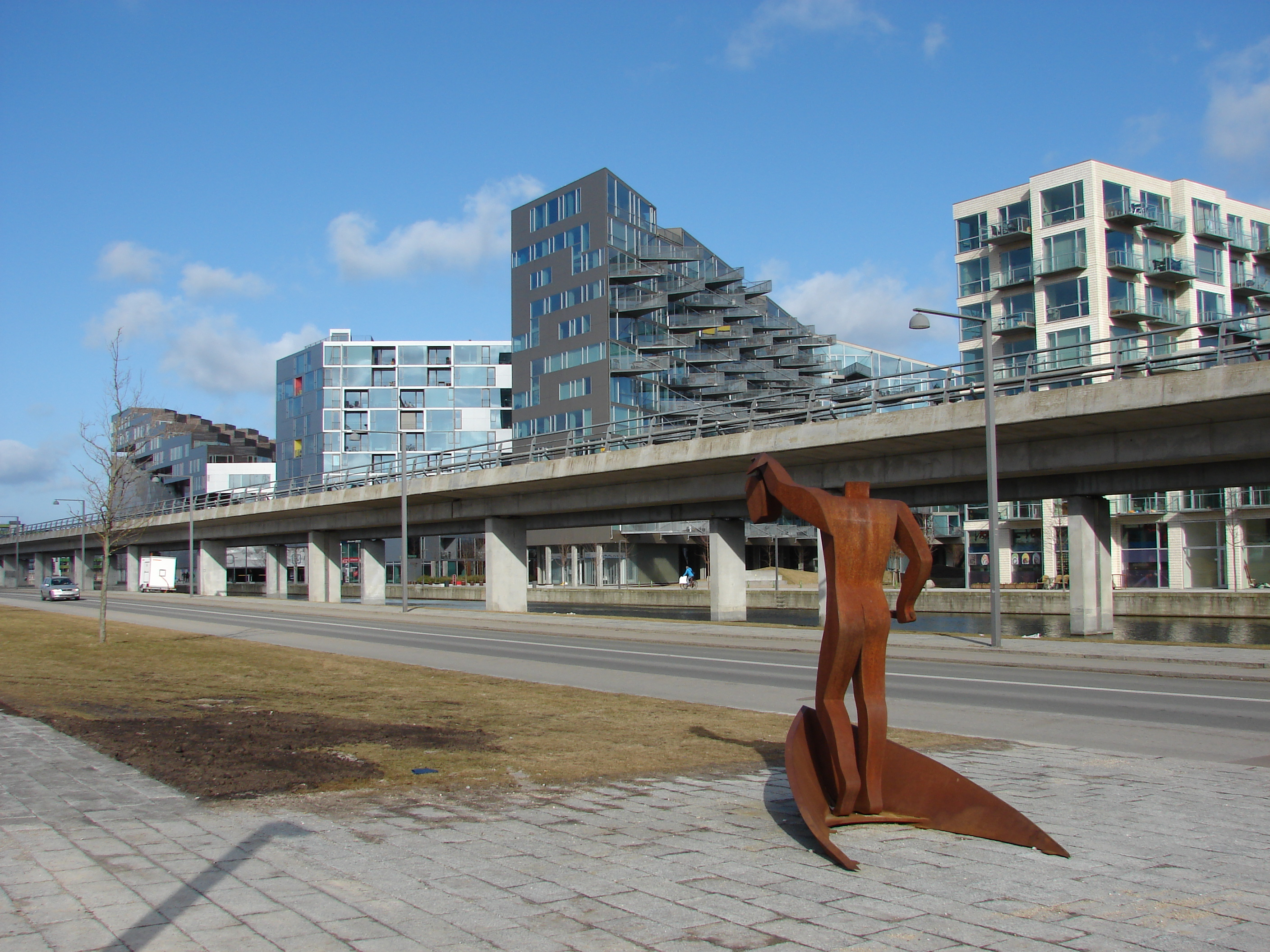 Ørestaden, Amager ved København